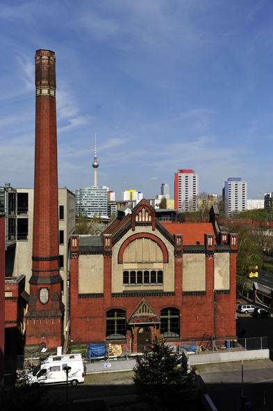 Berlin Kanalisation, Radialsystem V, Abwasser Pumpstation an der Spree, Holzmarktstrasse 33